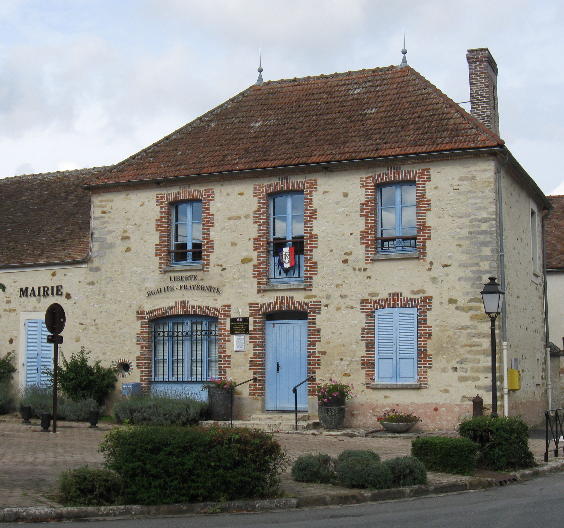 Mairie de Sognolles-en-Montois (département de la Seine-et-Marne, région Île-de-France).